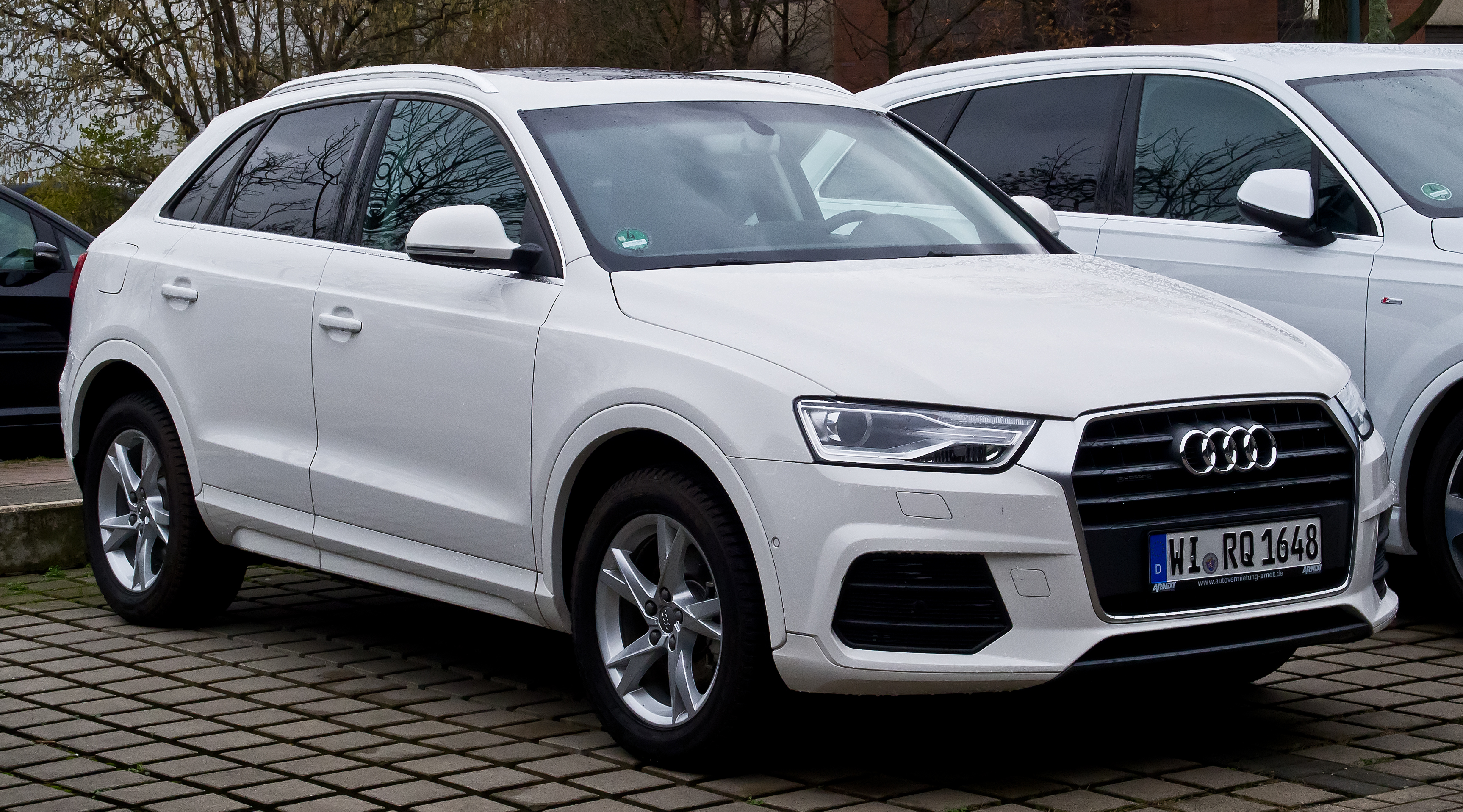 Audi Q3 quattro Sport (Facelift)